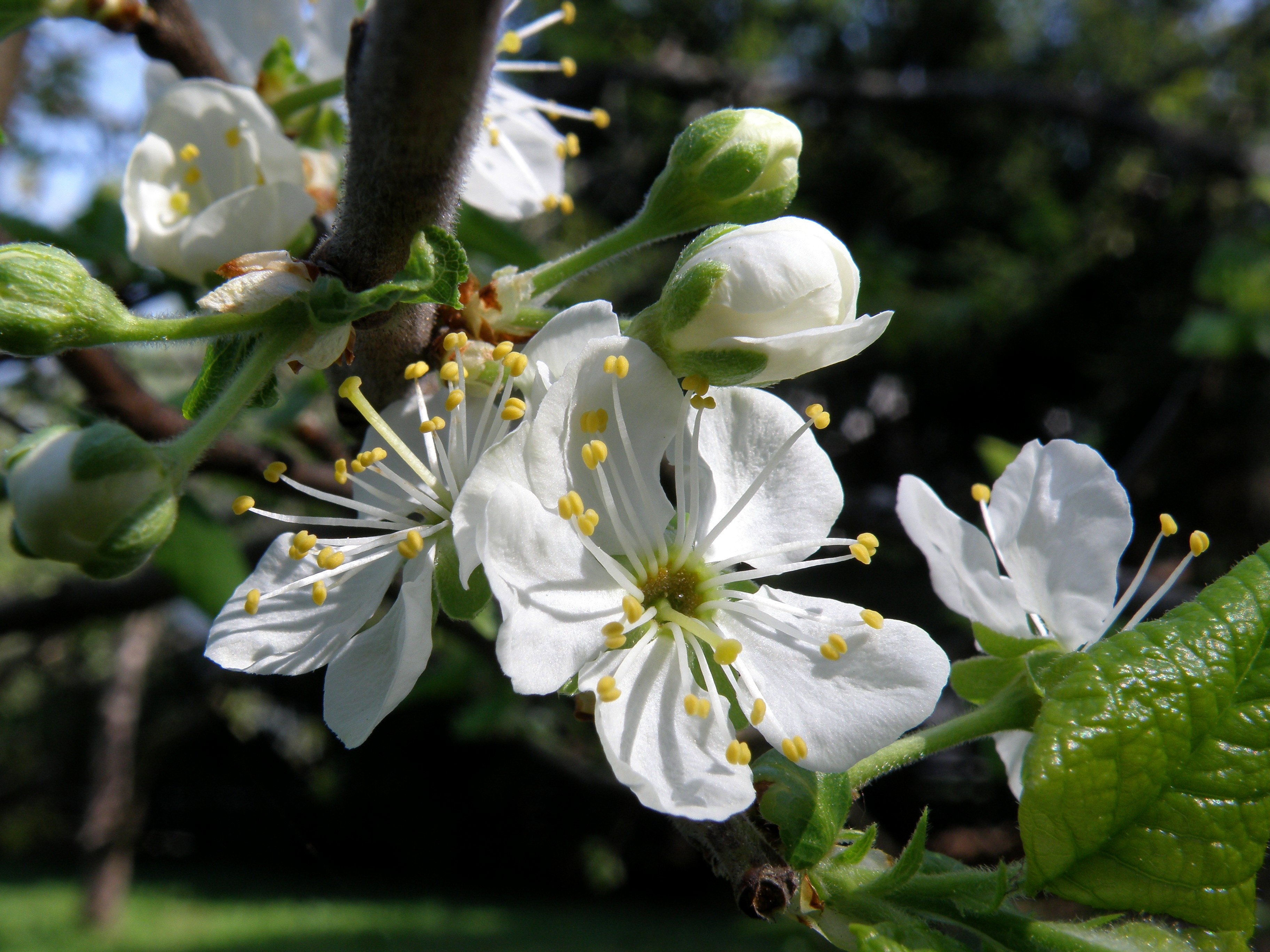 Prunus domestica 'Emma Leppermann'